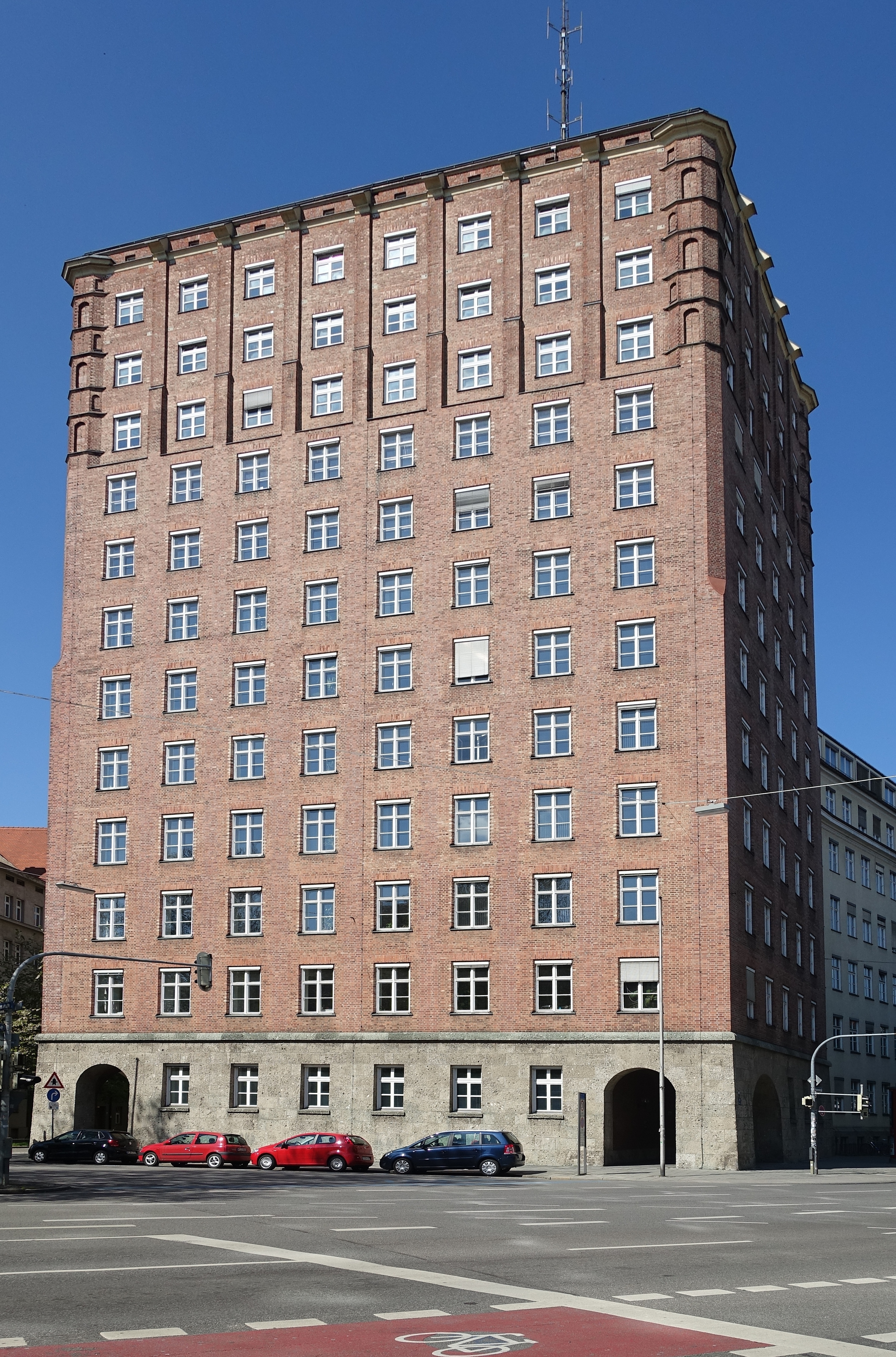 Das Hochhaus an der Blumenstraße